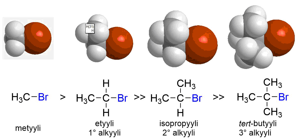 Alkyylibromidien sunteellinen reaktiivisuus. Metyyliryhmien lisääminen lisää elektrofiilisen hiiliatomin steeristä estettä. Isopropyyli- ja tert-butyylibromidi eivät reagoi SN2-mekanismilla.